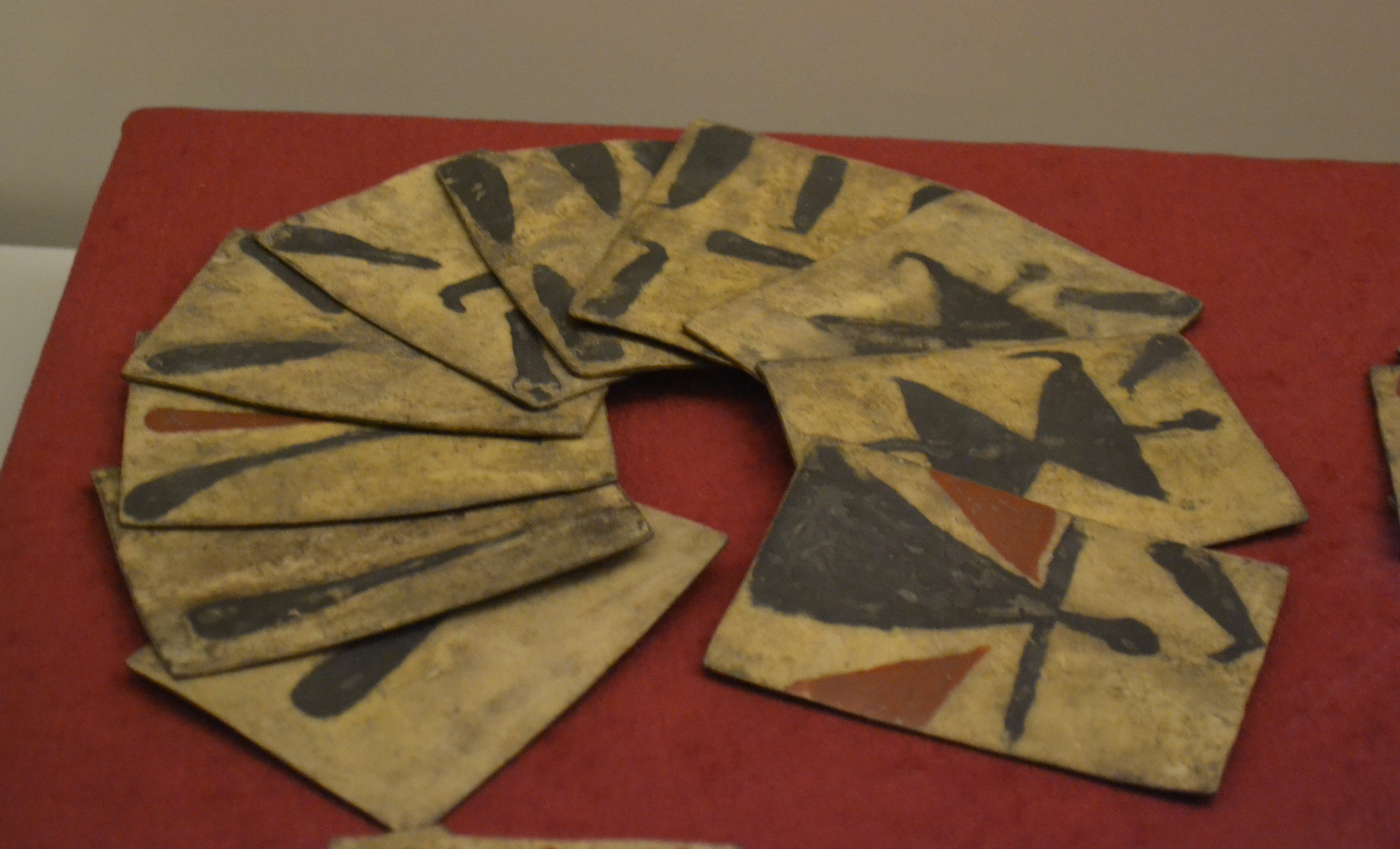 Baraja española de cuero de los indios mapuches. Se compone de 39 naipes y la usaban los varones indígenas de Chile. Siglso XVI-XVII. Números de inventario 13.638 a 13.676. Museo de América.